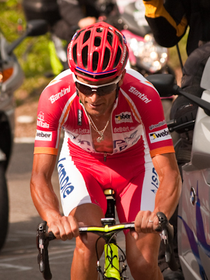 Fatiche da cronoscalata. 94° Giro d' Italia.